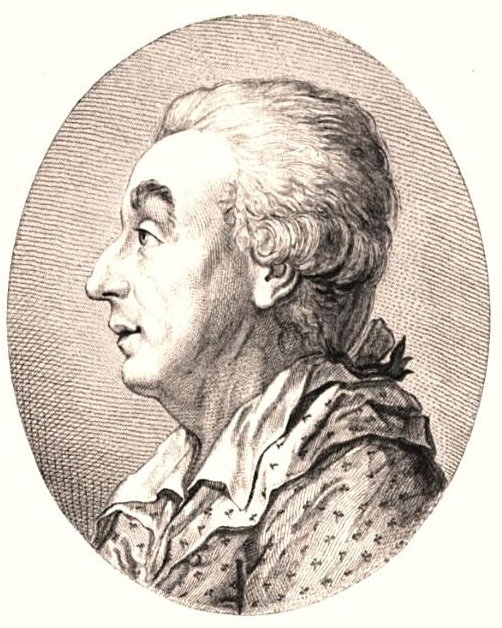 Portrait de profil de l'avocat d'Aix-en-Provence Jean Joseph Pierre Pascalis